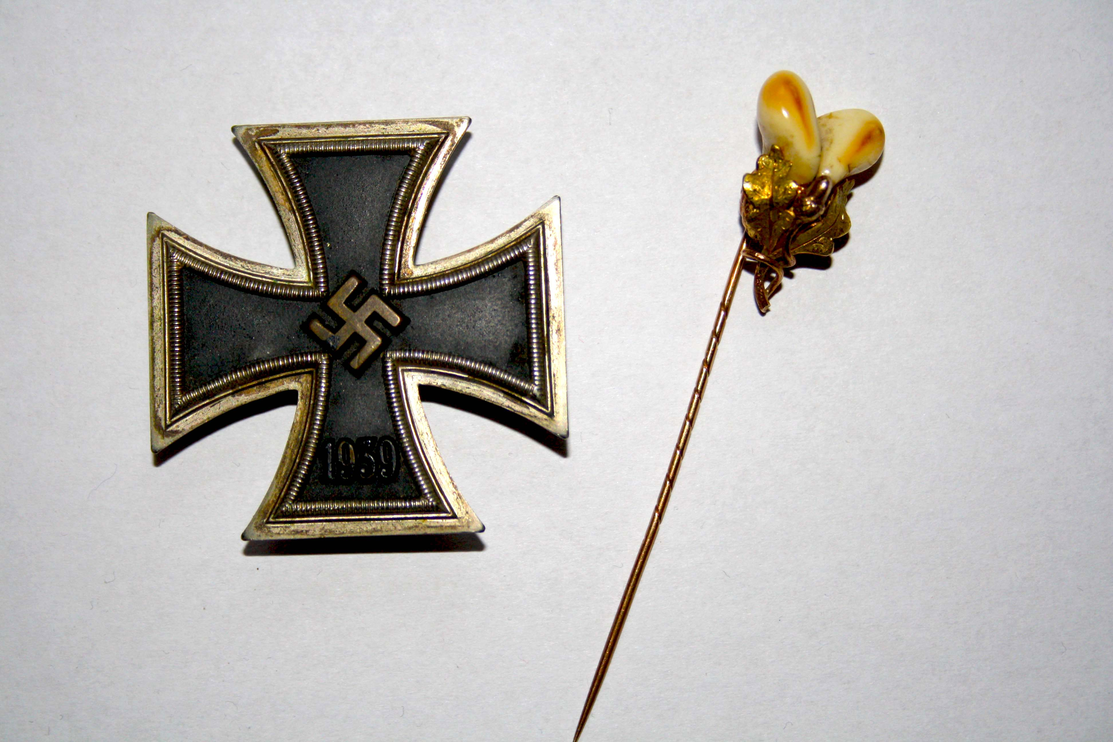 Helmut Wicks Eisernes Kreuz I. Klasse und seine Eichenlaub Anstecknadel aus Familienbesitz. Legal disclaimer This image shows (or resembles) a symbol that was used by the National Socialist (NSDAP/Nazi) government of Germany or an organization closely associated to it, or another party which has been banned by the Federal Constitutional Court of Germany. The use of insignia of organizations that have been banned in Germany (like the Nazi swastika or the arrow cross) are also illegal in Austria, Hungary, Poland, Czech Republic, France, Brazil, Israel, Ukraine, Russia and other countries, depending on context. In Germany, the applicable law is paragraph 86a of the criminal code (StGB), in Poland – Art. 256 of the criminal code (Dz.U. 1997 nr 88 poz. 553).